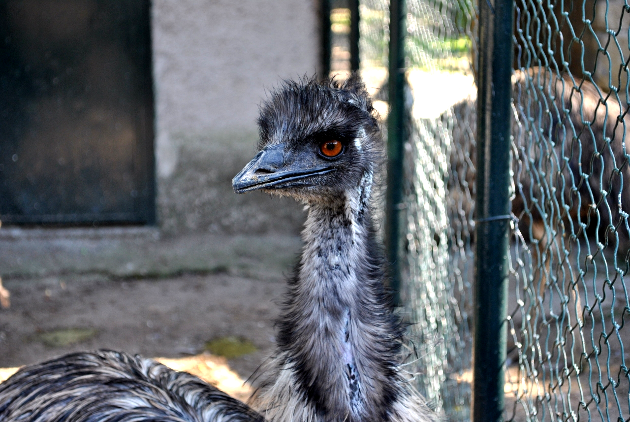 Un emù allo zoo di Napoli